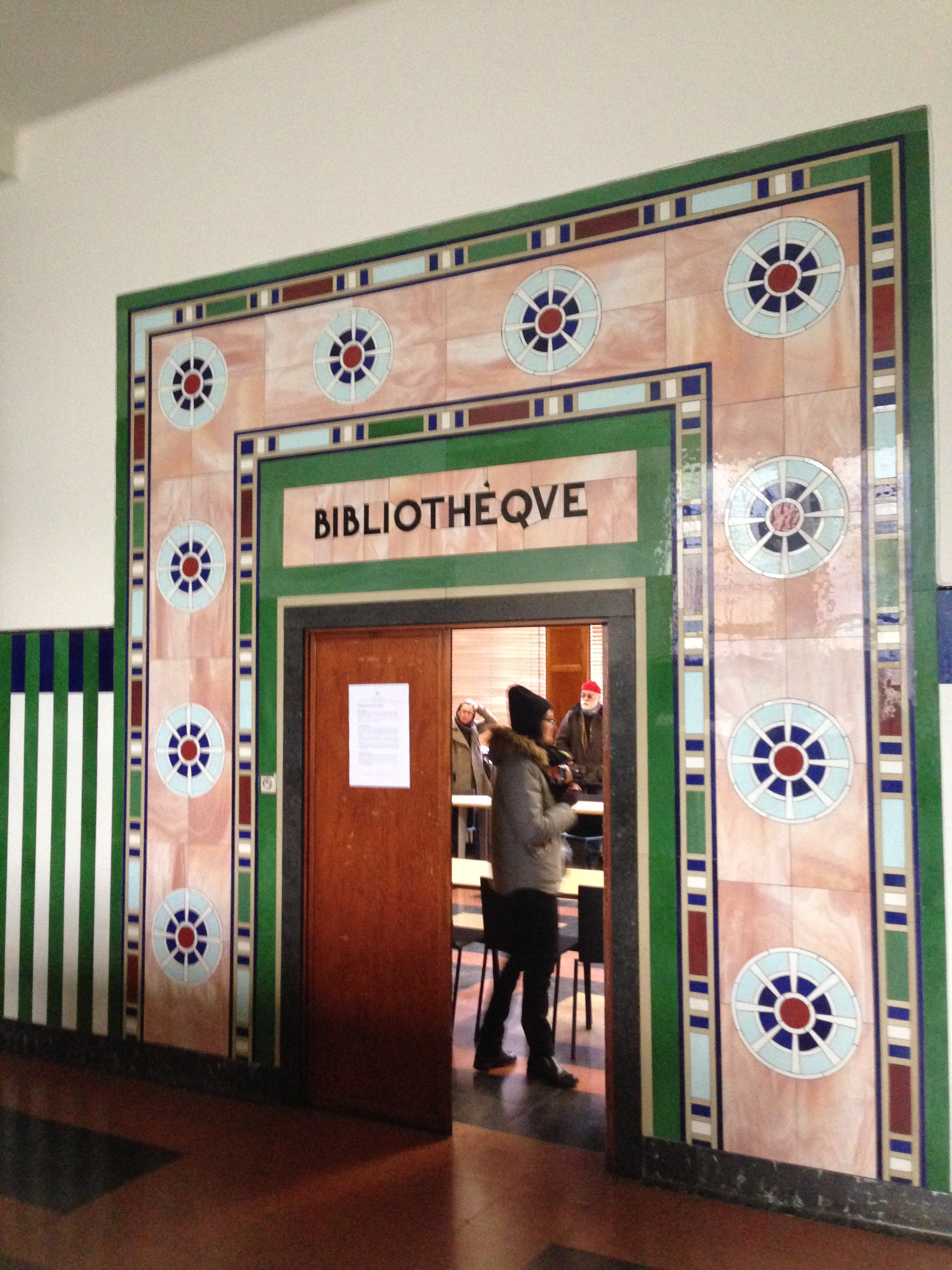 Fondation Médicale Reine Elisabeth Hôpital Brugmann, Bruxelles Architecte HEnry Lacoste